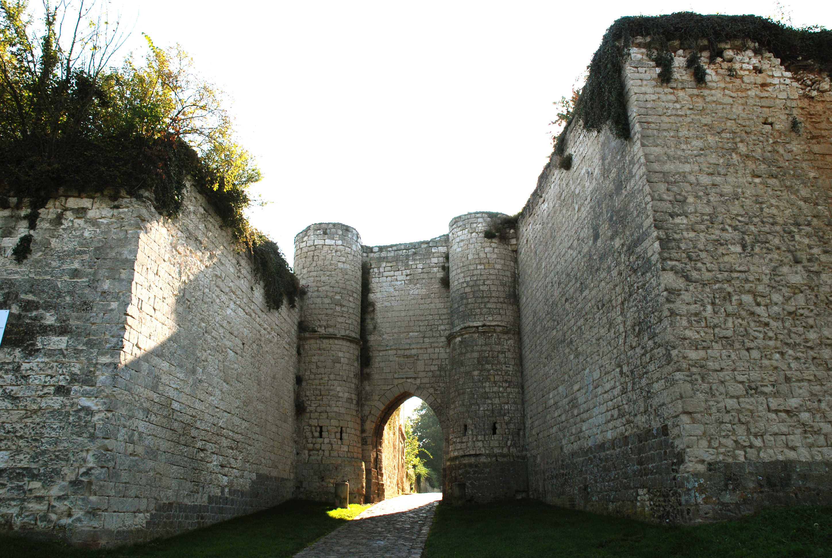 Château à Picquigny (France)